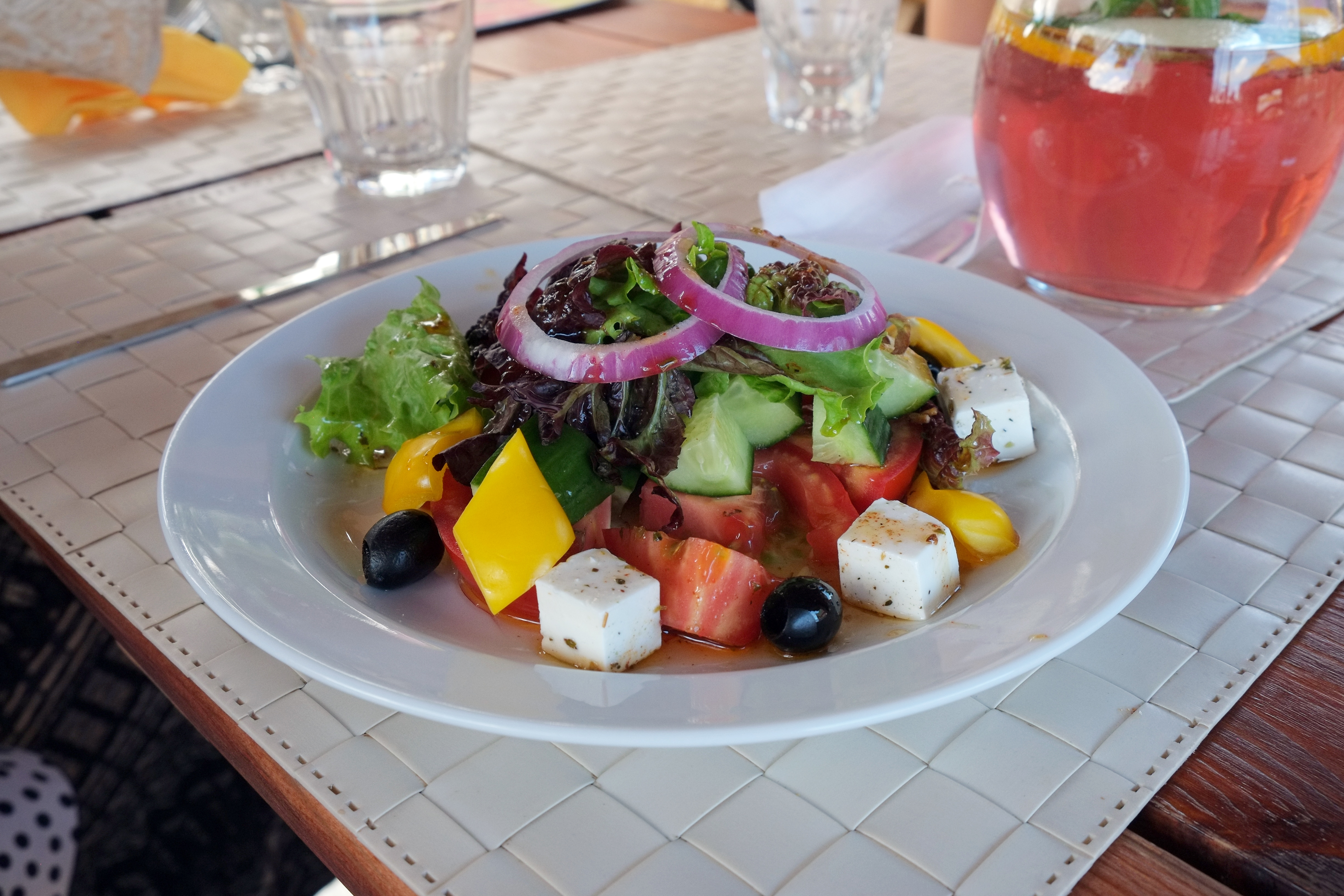 "Greek" salad